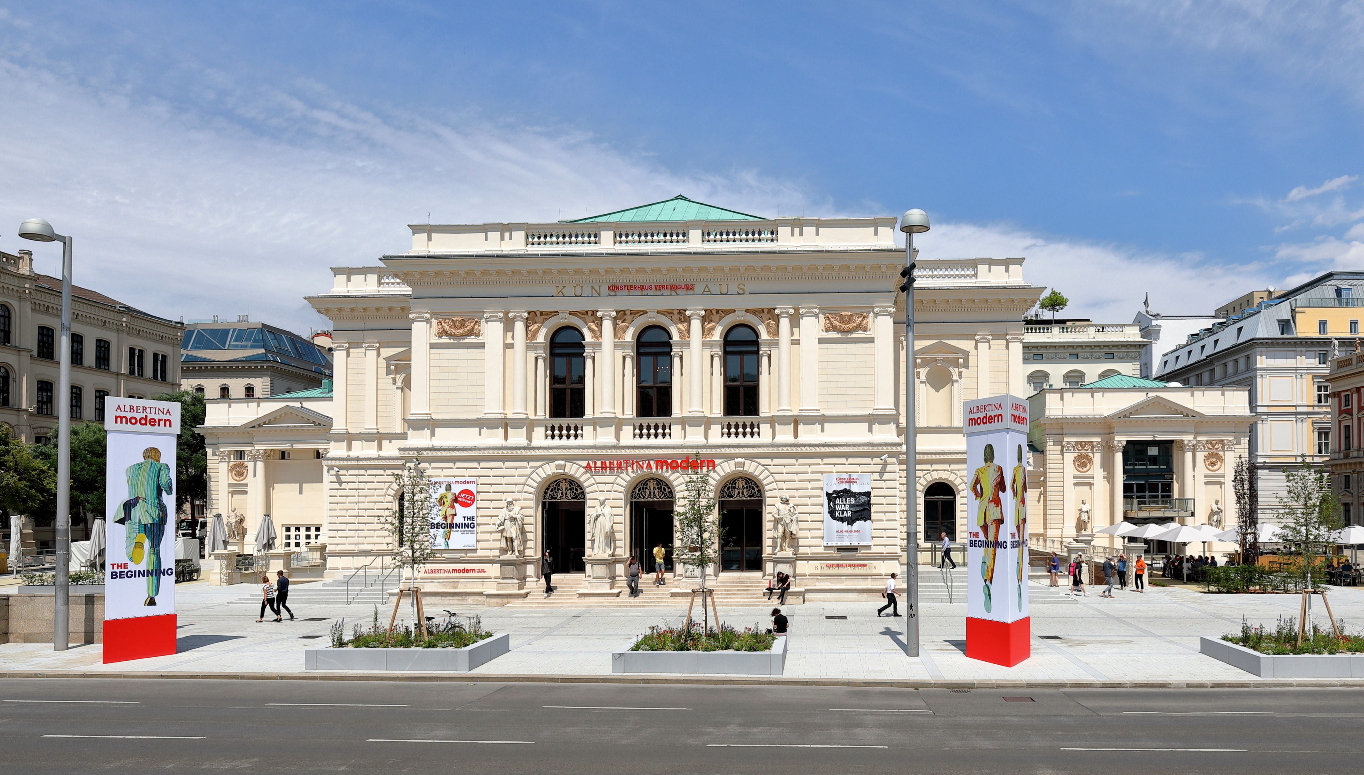 Das Museum „Albertina modern“, als zweiter Standort der Albertina, an der Adresse Karlsplatz Nr. 5 im 1. Wiener Gemeindebezirk Innere Stadt.Beheimatet ist die „Albertina modern“ im Künstlerhaus, einem nach Plänen von August Weber ab 1865 im Stil der italienischen Renaissance errichtetes Ausstellungshaus (Eröffnung am 1. September 1868). Ab 2017 wurde es renoviert und nach den Bedürfnissen eines modernen Museumsgebäude umgebaut. Auf rund 2.000 m2 Ausstellungsfläche werden Werke bedeutender, zeitgenössischer österreichischer und internationaler Künstler gezeigt. Am 27. Mai 2020 fand die Eröffnung statt, nachdem wegen der Corona-Pandemie die geplante am 13. März 2020 abgesagt werden musste. Die erste Ausstellung „The Beginning. Kunst in Österreich 1945 bis 1980“ bot mit 400 Kunstwerken erstmals einen umfassenden Überblick über die Kunst Österreichs in den ersten Jahrzehnten nach dem Zweiten Weltkrieg.